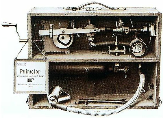 Pulmotor - Аппарат искусственной вентиляции легких